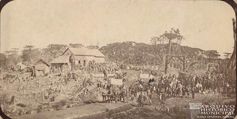 Comitiva oficial chegando de Porto Alegre para a instalação da Junta Governativa de Caxias do Sul, quando tomaram posse Salvador Sartori, Angelo Chittolina e Ernesto Marsiaj